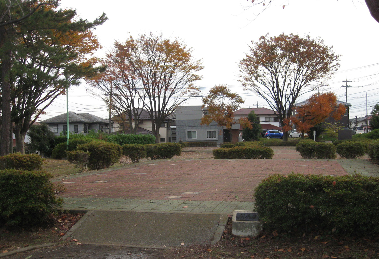 神奈川県海老名市 浜田歴史公園（上浜田遺跡）